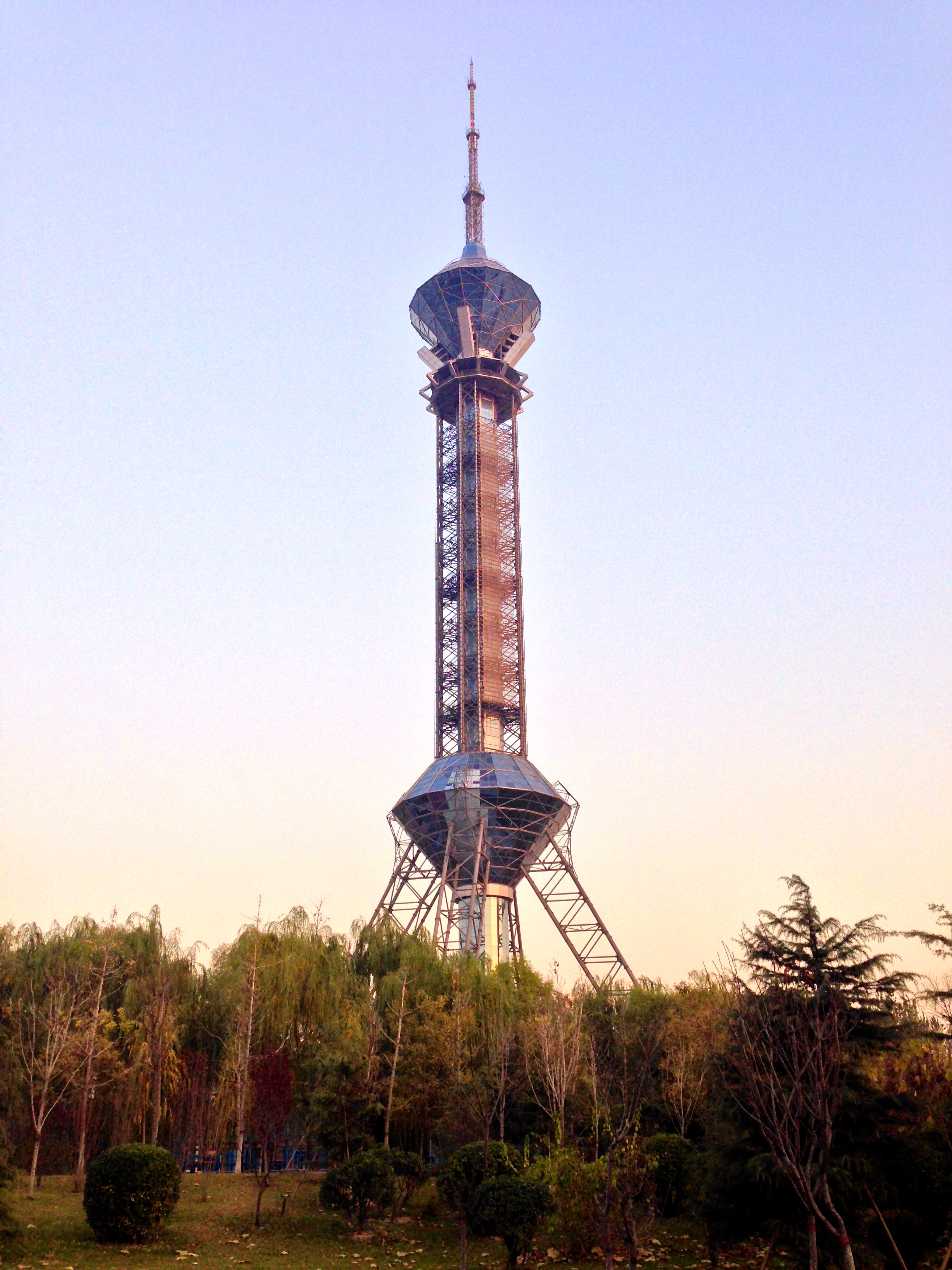 電視塔